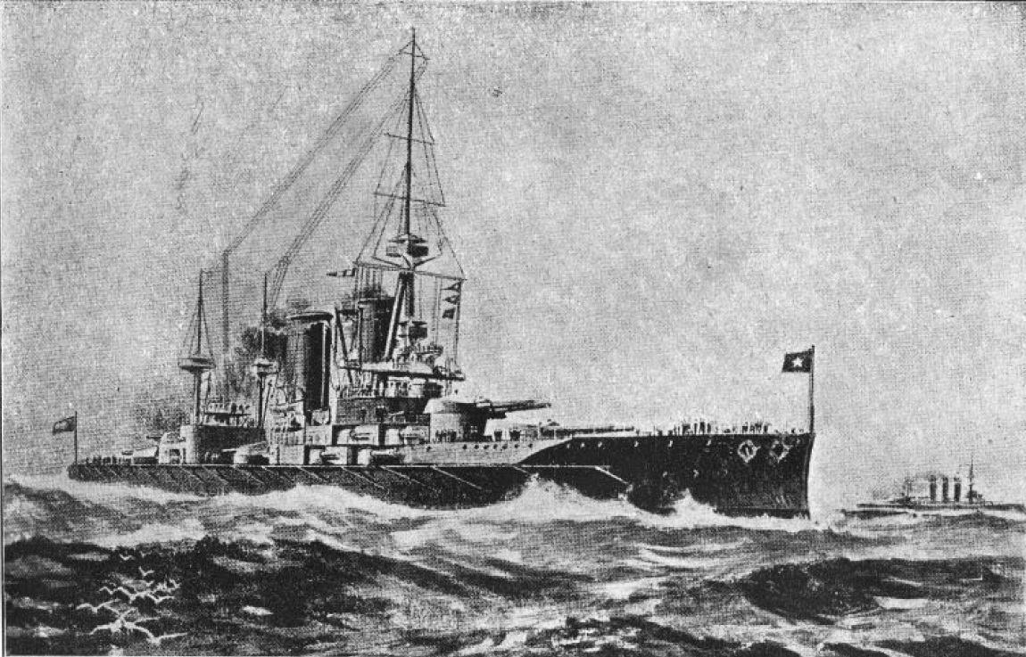 Acorazado «Almirante Latorre». Imagen en "El censo comercial industrial de la colonia italiana en Chile : resumen general de las actividades de la colonia" / Amadeo Pellegrini C., J. C. Aprile, 1926. Santiago : Impr. de la Colonia, 1926. 16, 1005 p.